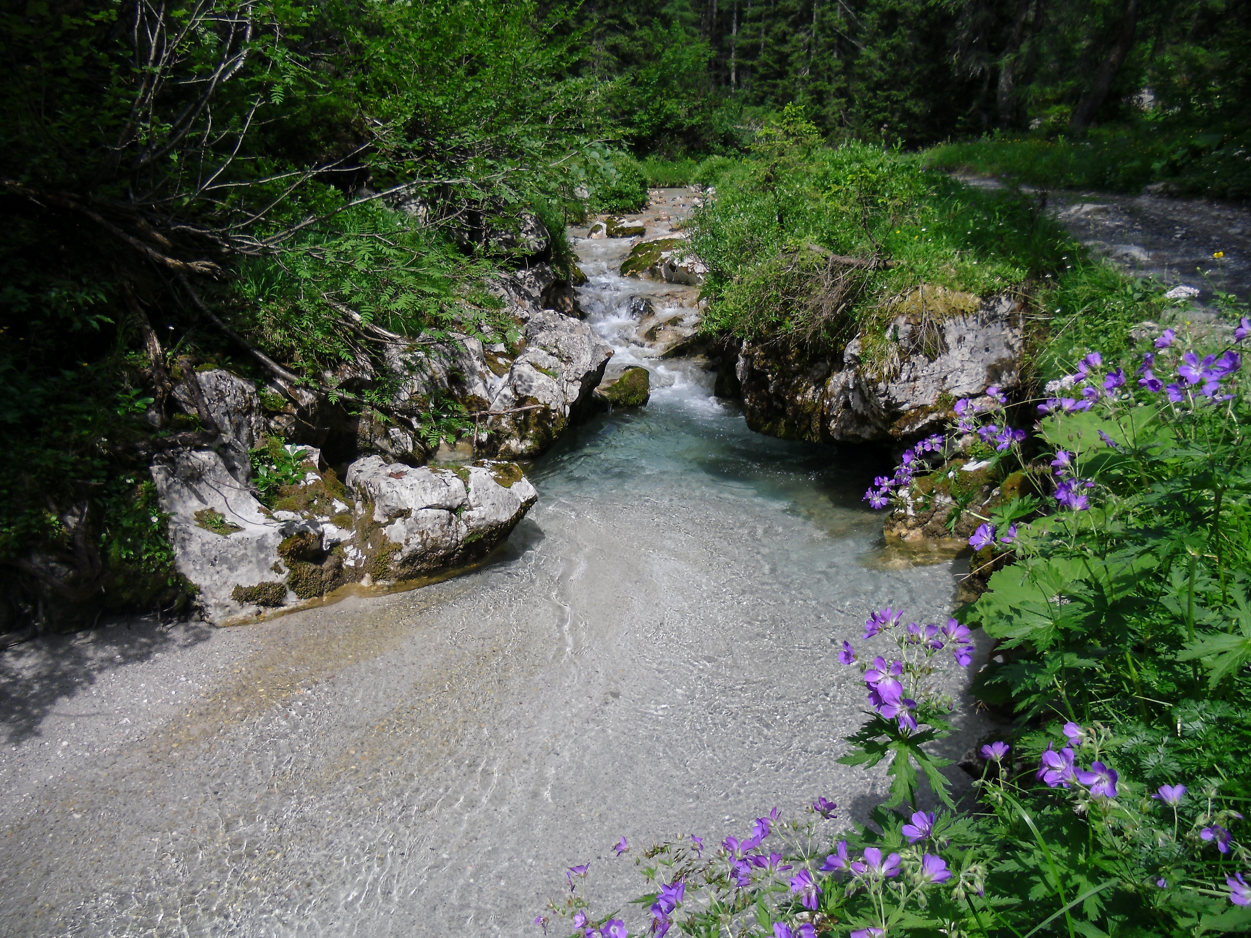 Dießbach